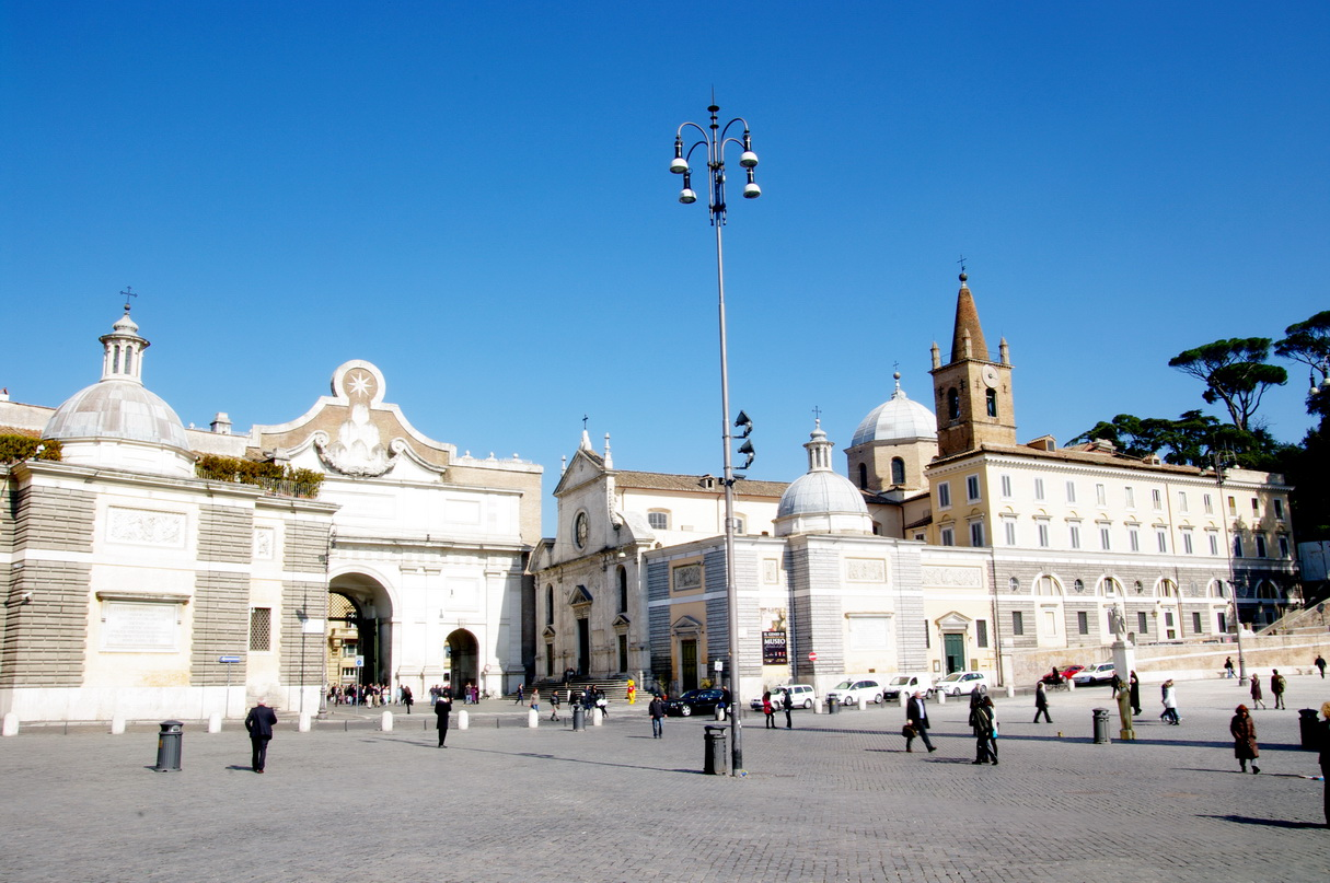 Santa Maria del Popolo und Stadttor an der Piazza del Popolo, Rom